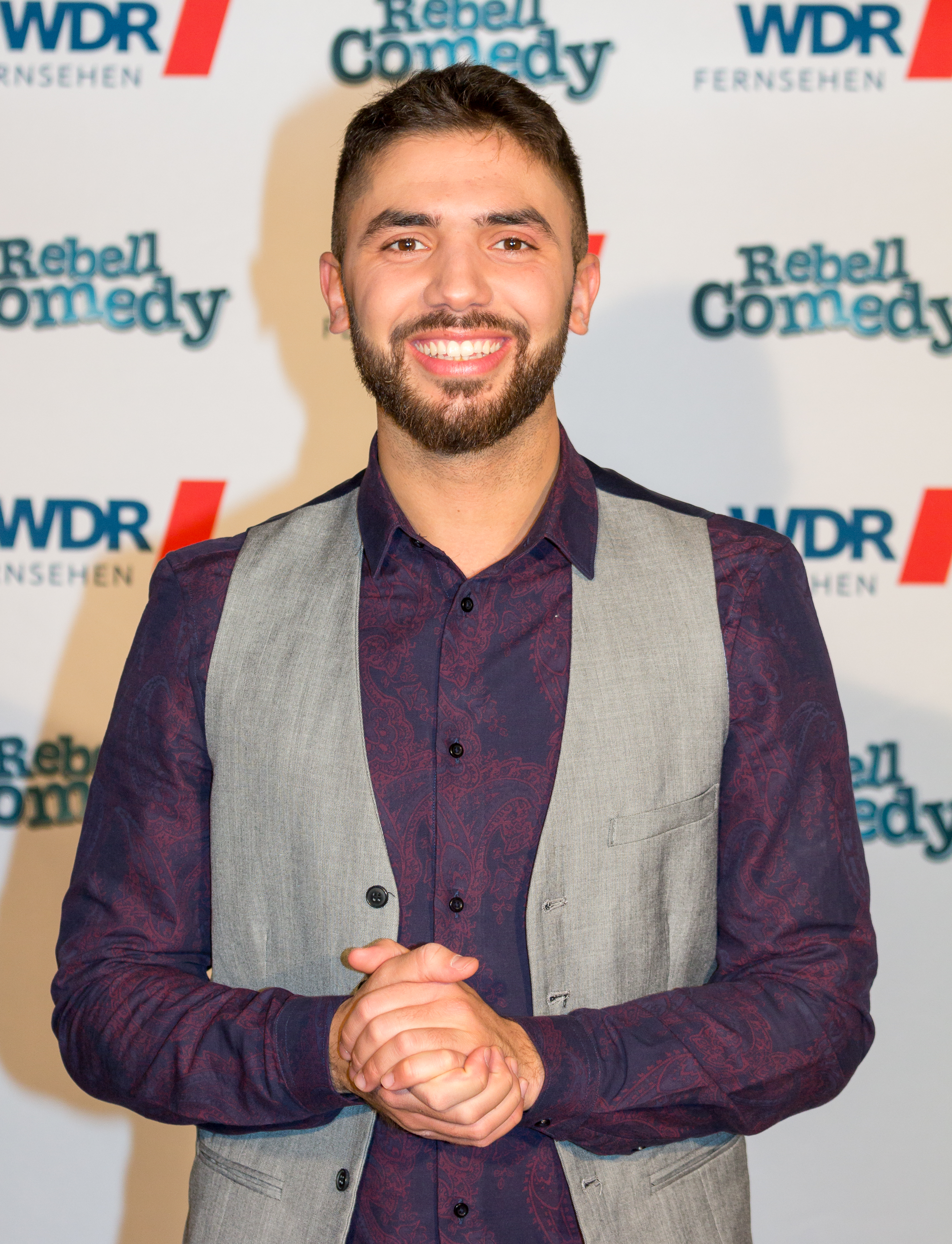 RebellComedy - WDR-Pressetermin im Gloria Foto: Khalid Bounouar